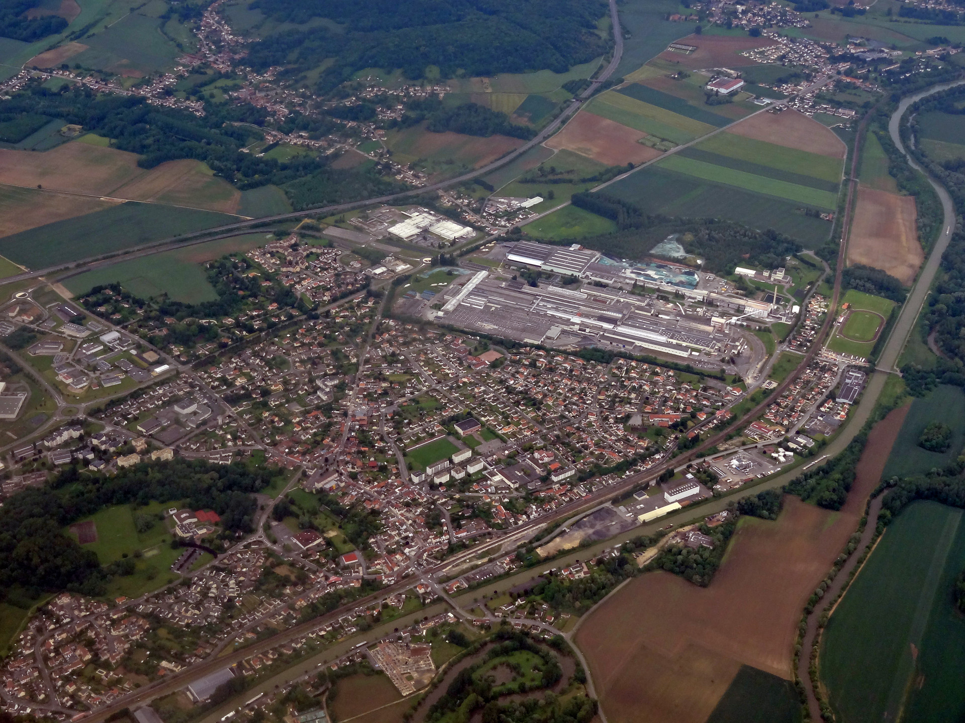 Vue aérienne de Thourotte (Oise), France.